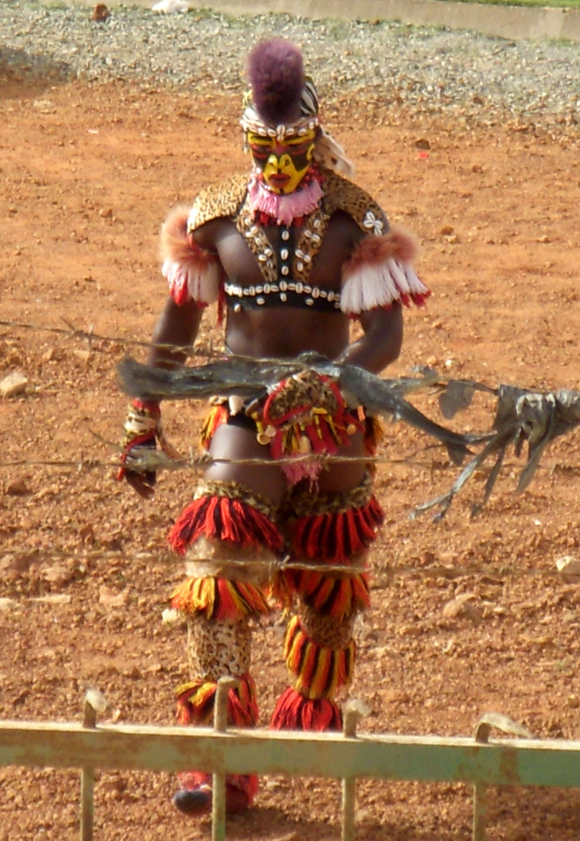 Un "Faux lion" qui anime avant le debut d'un combat. (photo légèrement retouchée : recadrage + contrastes)